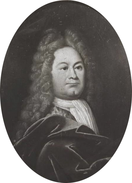 uitsnede van het portret van de dichter Jan van Hoogstraten (1662-1736)